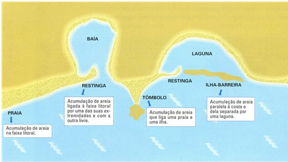 Ilustração dos Esporões Arenosos